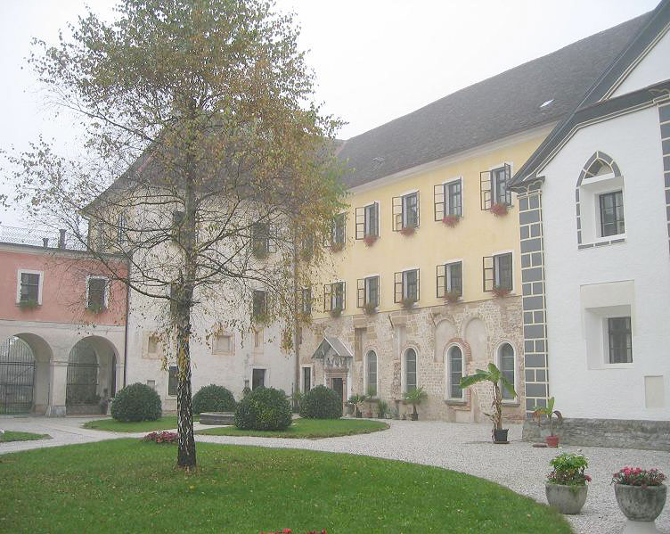 Monastery Sittich, Slovenia / samostan Stična, Slovenija / Kloster Sittich, Slowenien